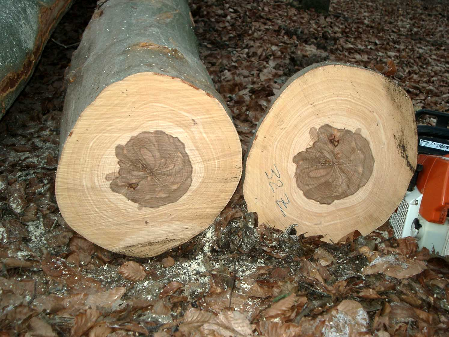 Querschnitt eines Rotbuchenstammes mit ausgeprägtem Rotkern